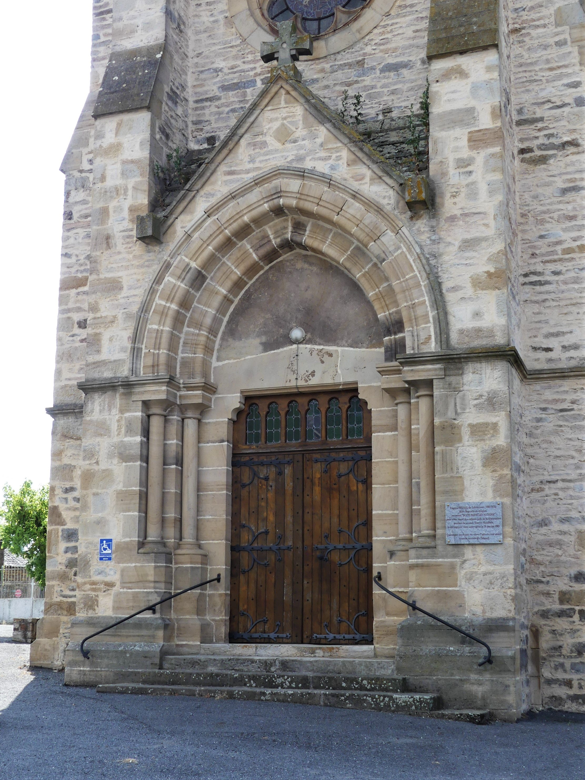 Le portail de l'église de Saint-Jean-Delnous, Aveyron, France.